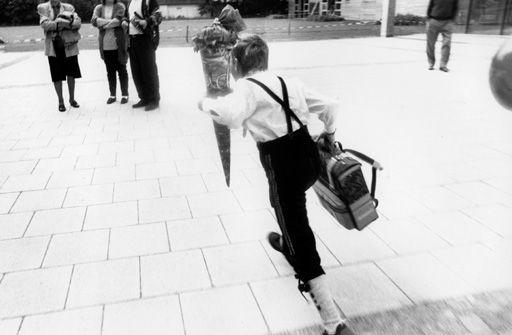 Erster Schultag